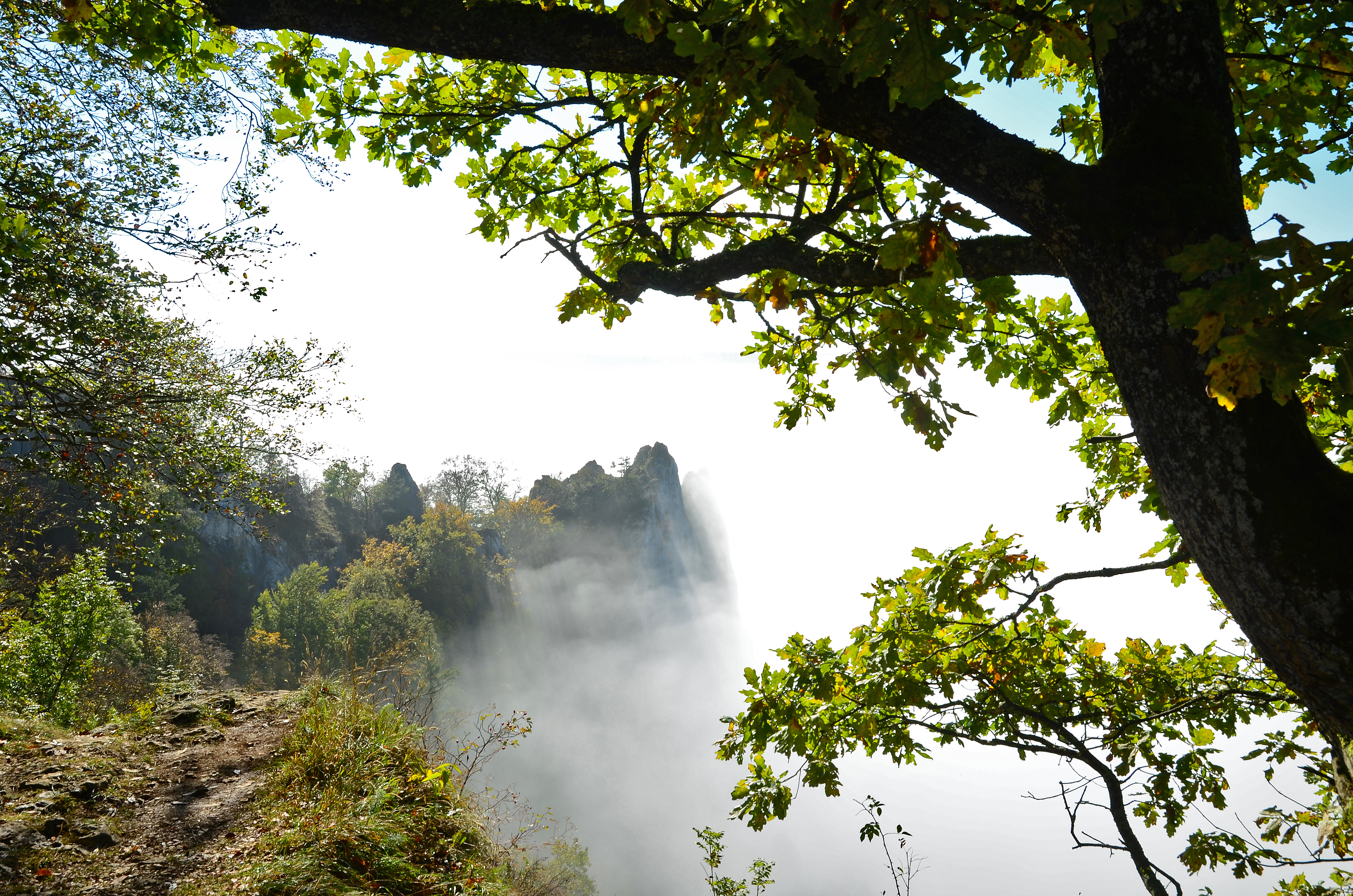 Naturpark Obere Donau, Herbstnebel liegt über der Donau, Süddeutschland, Southern Germany